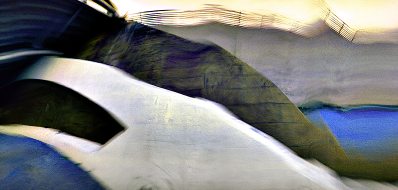 Kronprinzenbrücke Berlin, Fotogestaltung Joachim Wasserthal